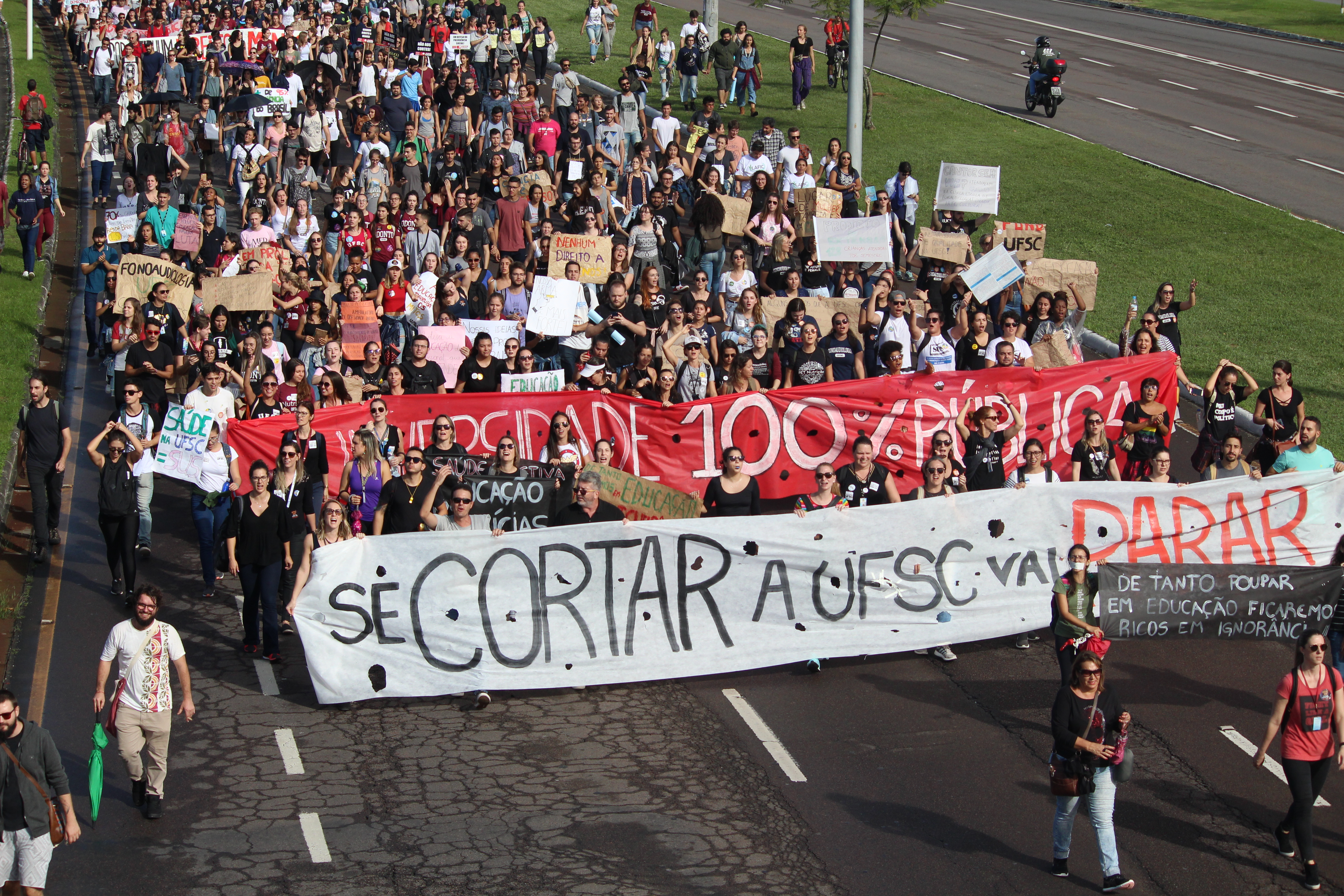 Devido às questões políticas, surgem propostas de corte de gastos e do aumento da previdência. Então, por causa disso, estudantes e simpatizantes unem forças. O movimento é resultado de uma iniciativa dos estudantes de escolas públicas e também de professores de universidades federais e estaduais. Esse movimento foi tanto iniciado pela UFSC, quanto pela Udesc.